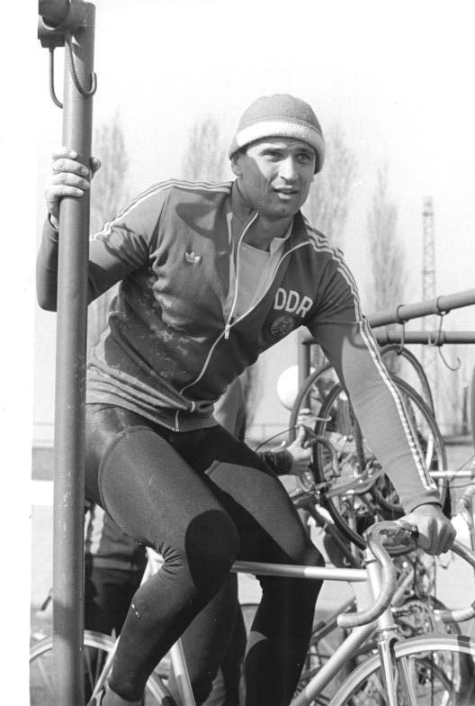 Lutz Heßlich ADN-ZB Settnik 15.4.88 Berlin: Sprint - Zum Freiluft-Auftakt der DDR-Sprinter und 1 000-m-Spezialisten auf der Radrennbahn in Berlin-Weissensee ließ sich Weltmeister Lutz Heßlich (SC Cottbus) den Sieg im Kampfsprint nicht nahmen - hier während des Trainigs zwischen zwei Endläufen.